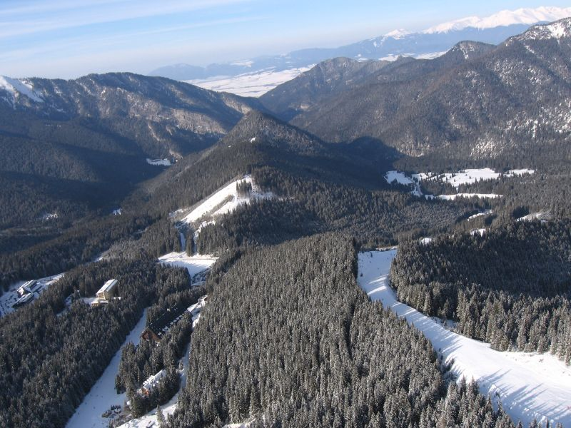 Chopok